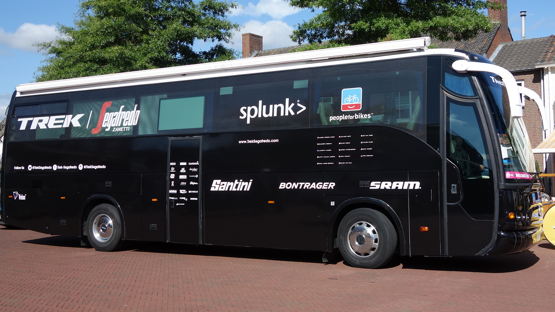 Bus van Trek-Segafredo bij de start van de eerste etappe van Stramproy naar Weert in de Boels Ladies Tour 2019